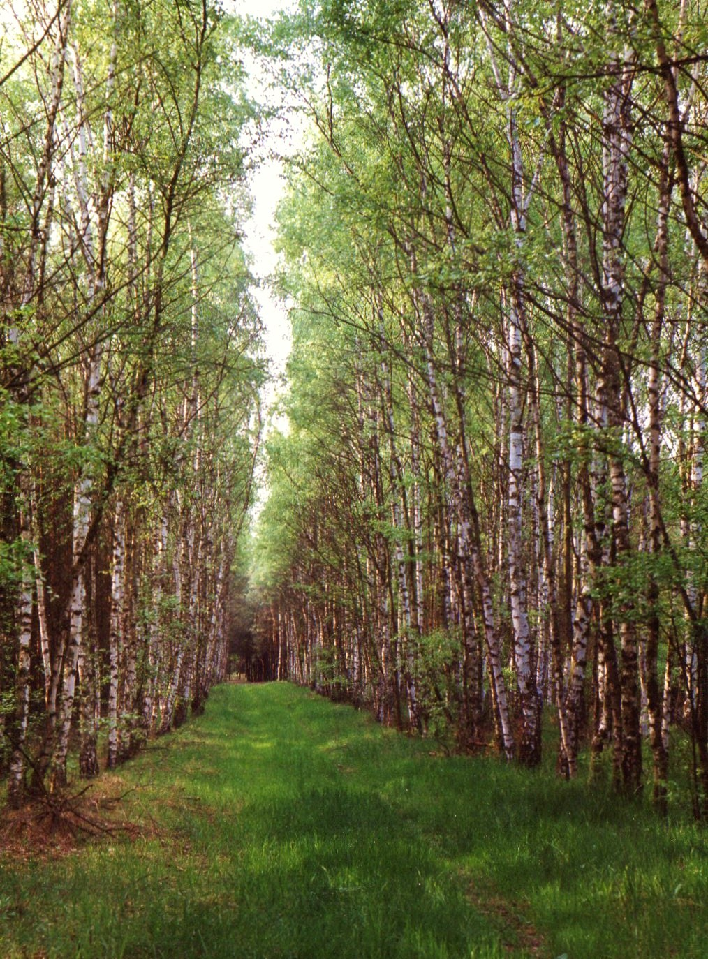 Okolicy ul. Konopnej w Poznaniu - maj 1993r.